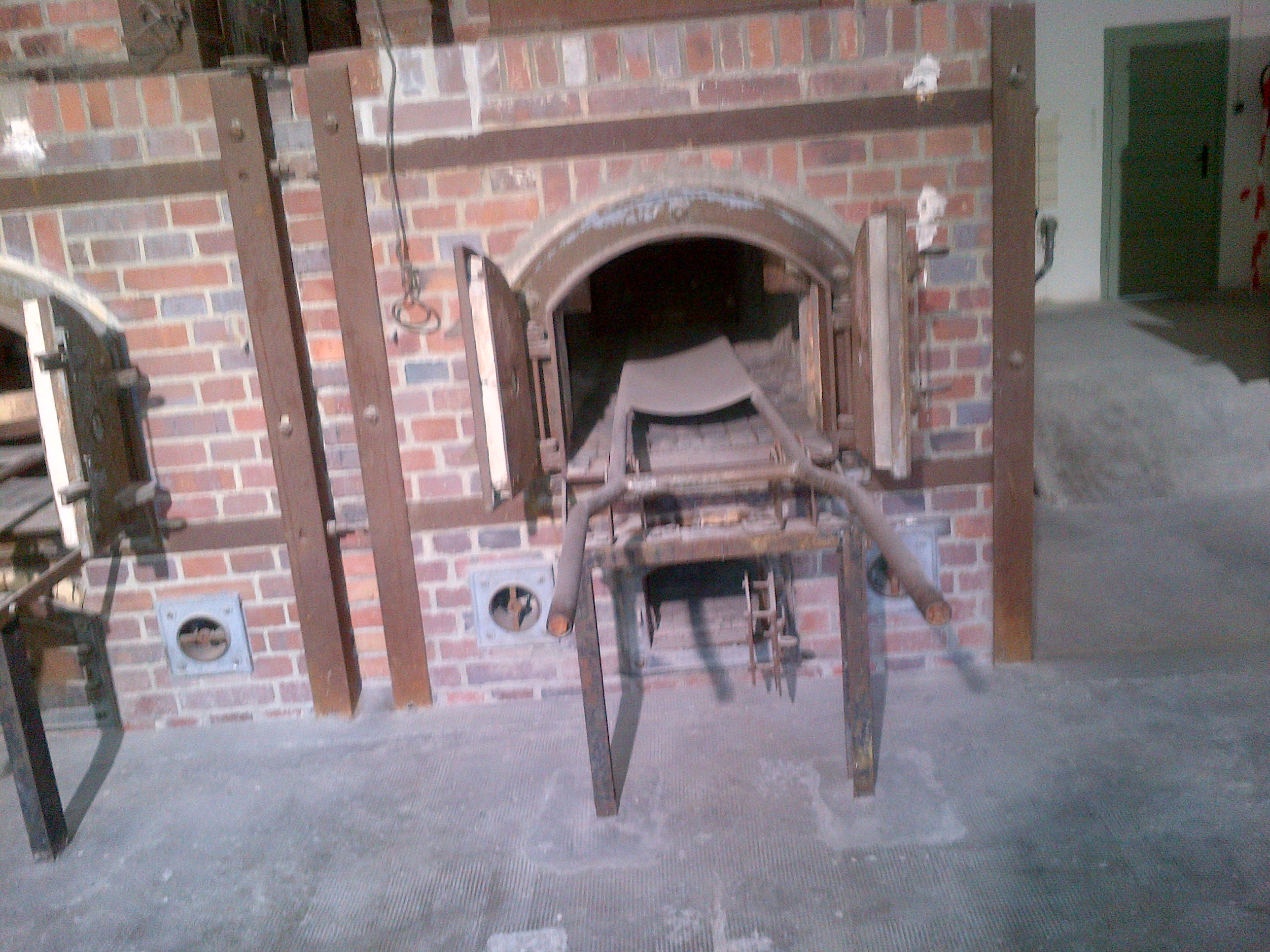 Hornos en el campo de concentracion de Dachau.